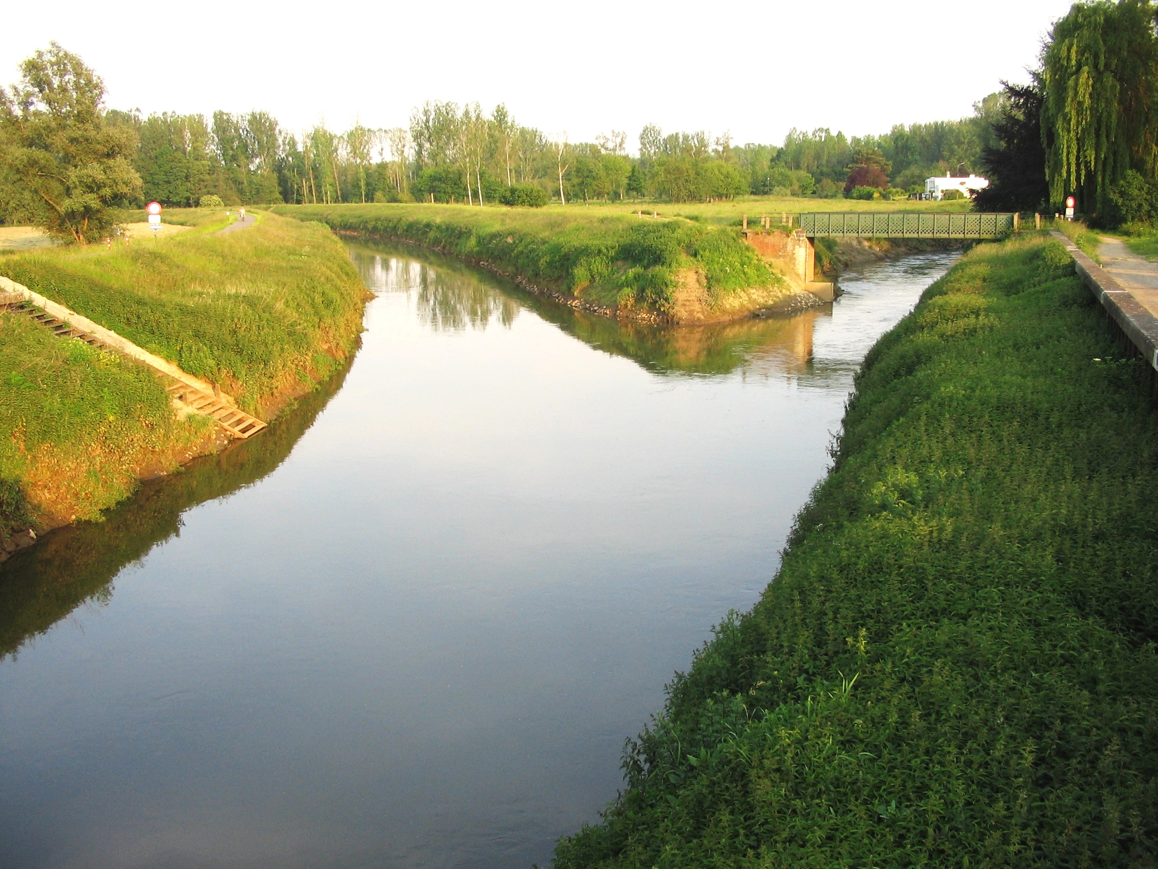 Demer an Dijle bei Werchter